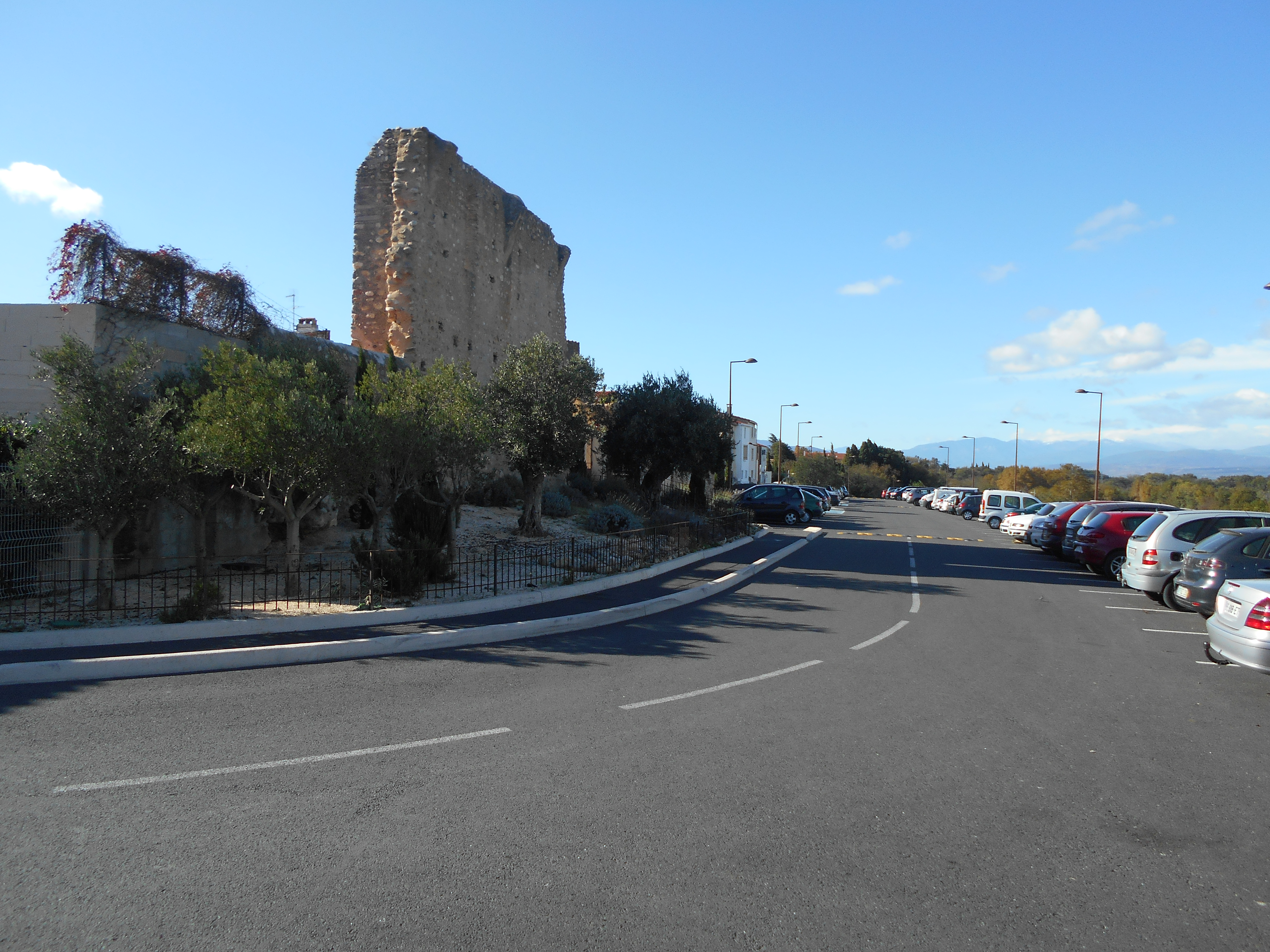 Sant Domènec del Castell, al Soler